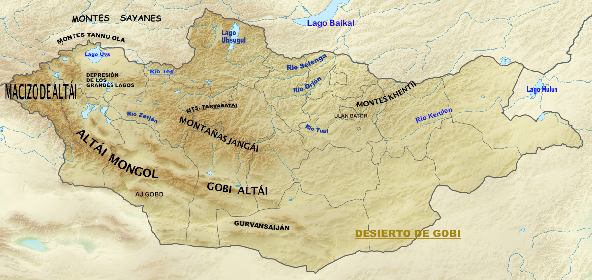 Mapa topográfico con nombres de montañas y ríos a partir de Relief map of Mongolia.png